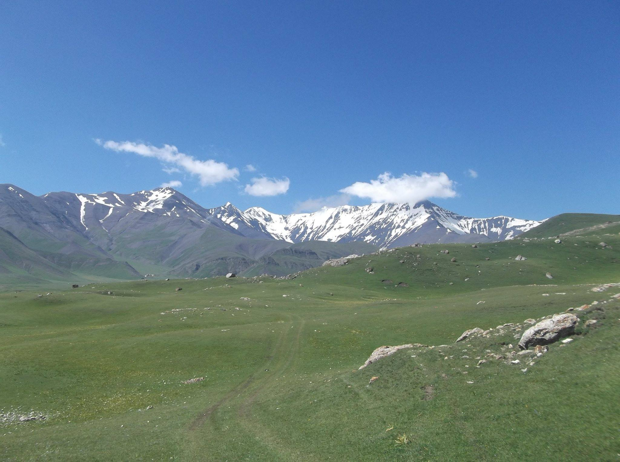 Bazardüzübuzlağ